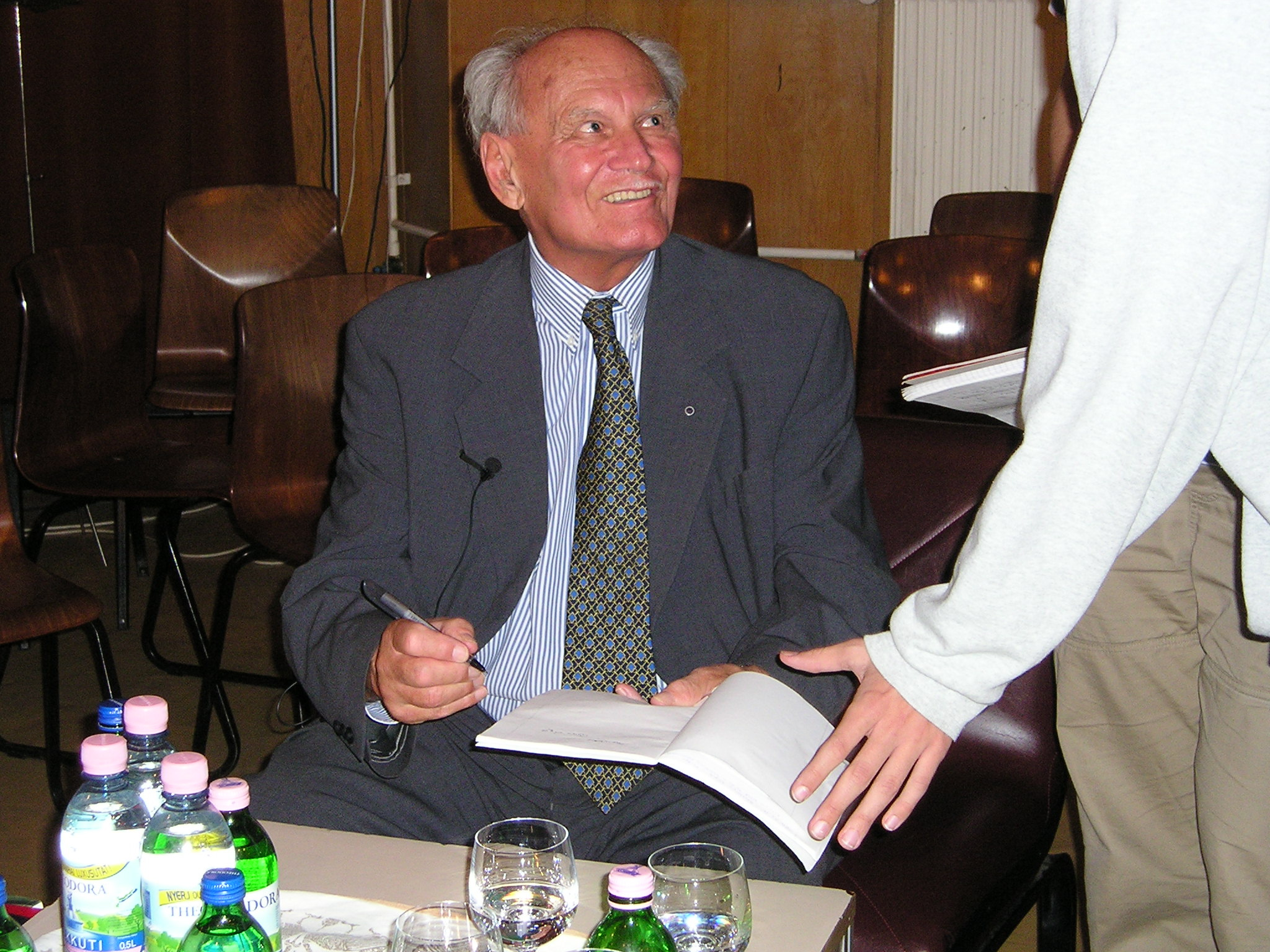 Göncz Árpád dedikál a Berzsenyi Dániel Gimnáziumban